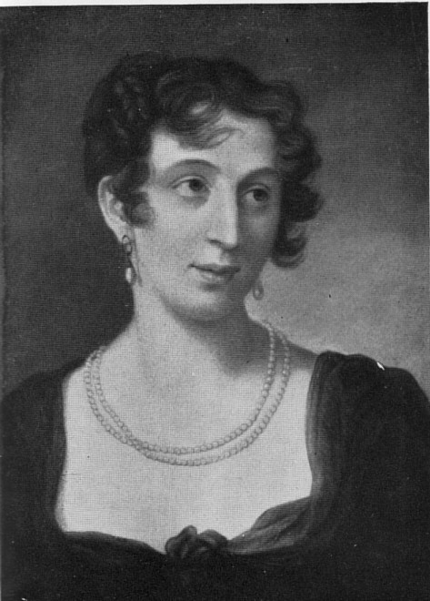 Sylvie von Ziegesar. Pastellgemälde von Louise Seidler, Goethe-Nationalmuseum.